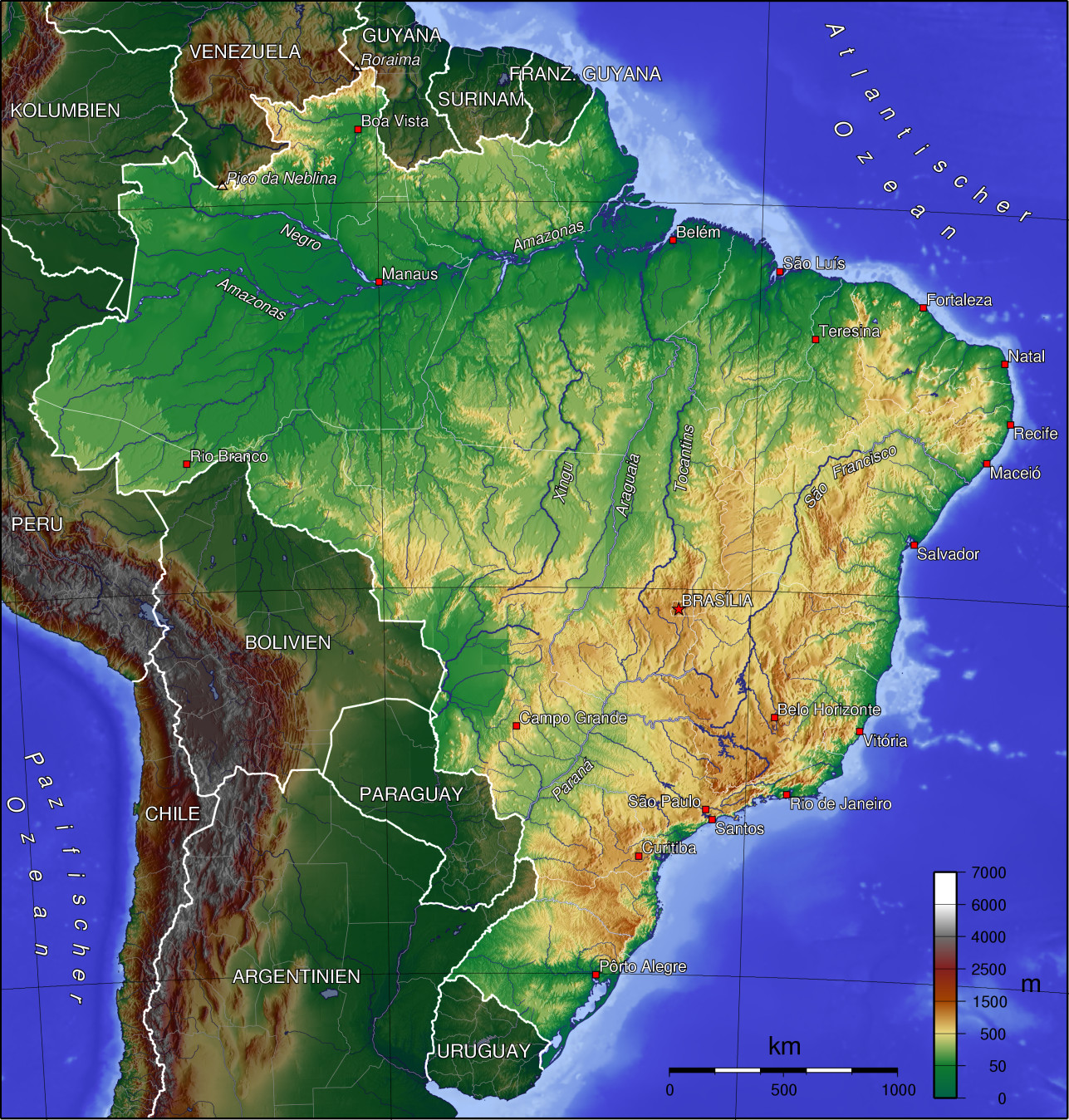 Topografia do Brasil.